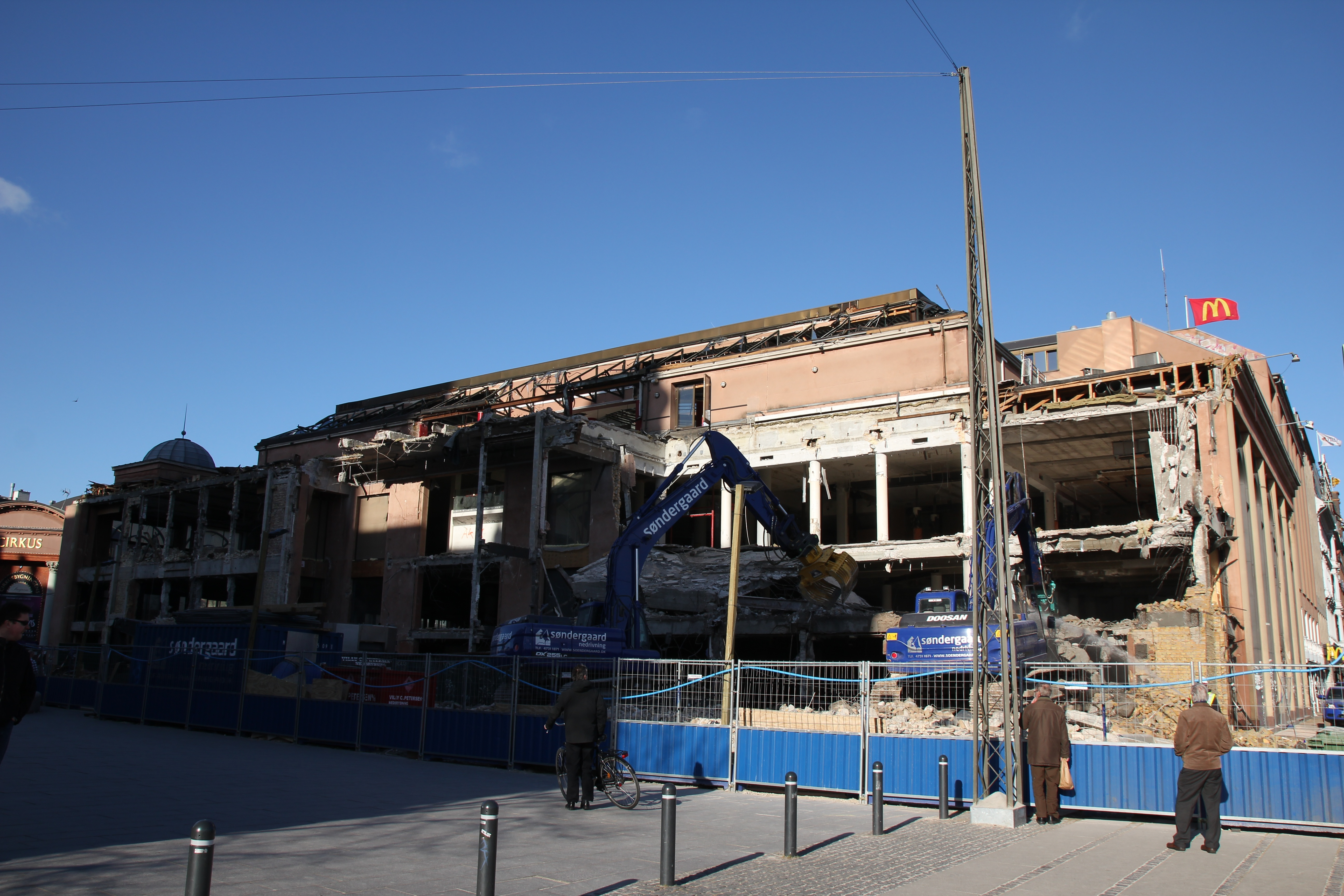 Scala under nedrivning i foråret 2012